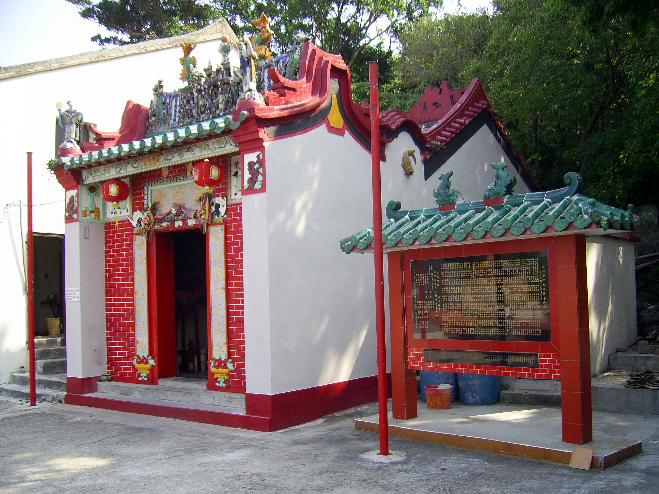 中文（香港）: 長洲西灣天后宮